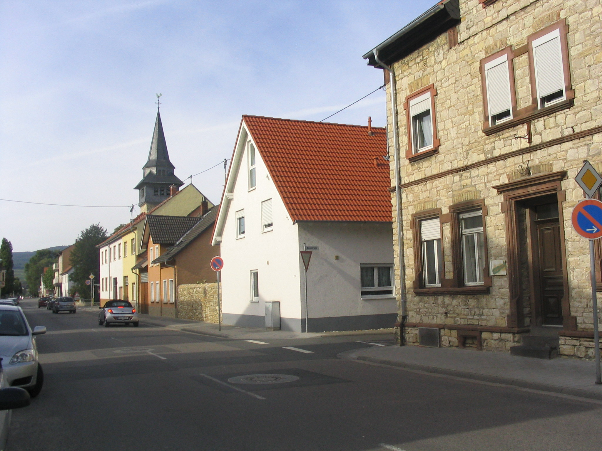 Rheinstraße mit Blick zur Evangelischen Kirche aufgenommen am 15.09.2007 von Dr. Hagen Graebner